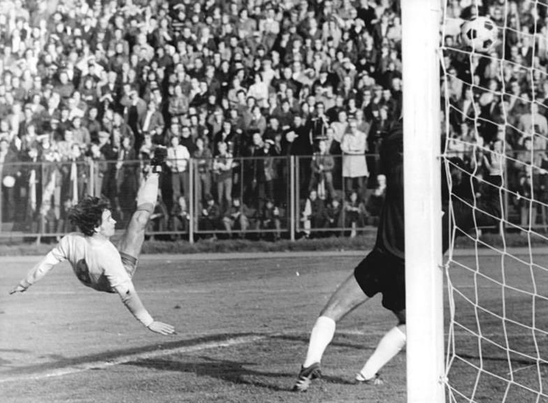 +ADN-ZB-Gahlbeck- -1-11-75-ba Leipzig: Vom 9. Spieltag der Fußball-Oberliga- Mit sehenswertem Fallrückzieher überwindet der Kapitän der Lok-Mannschaft, Henning Frenzel, den Erfurter Schlußmann Klaus Reßler und erzielt das 2:0. Die Begegnung zwischen dem 1. FC Lok Leipzig und dem FC Rot-Weiß Erfurt am 1.11. endete 3:0 für die Leipziger.